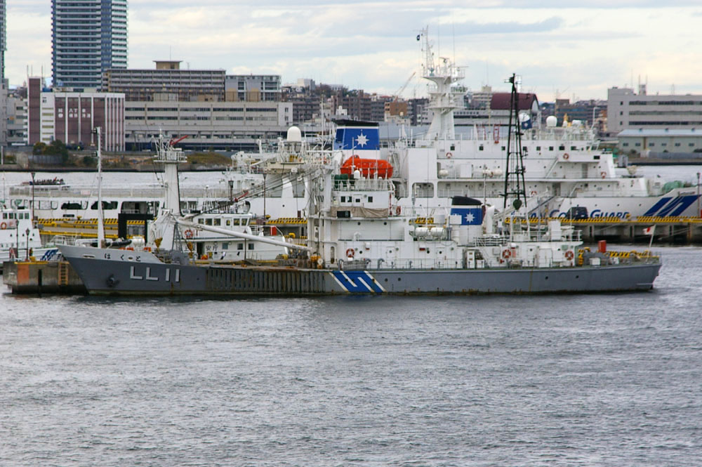 Japan Coast Guard LL11 Hokuto. (buoy layer), yokohama, japan